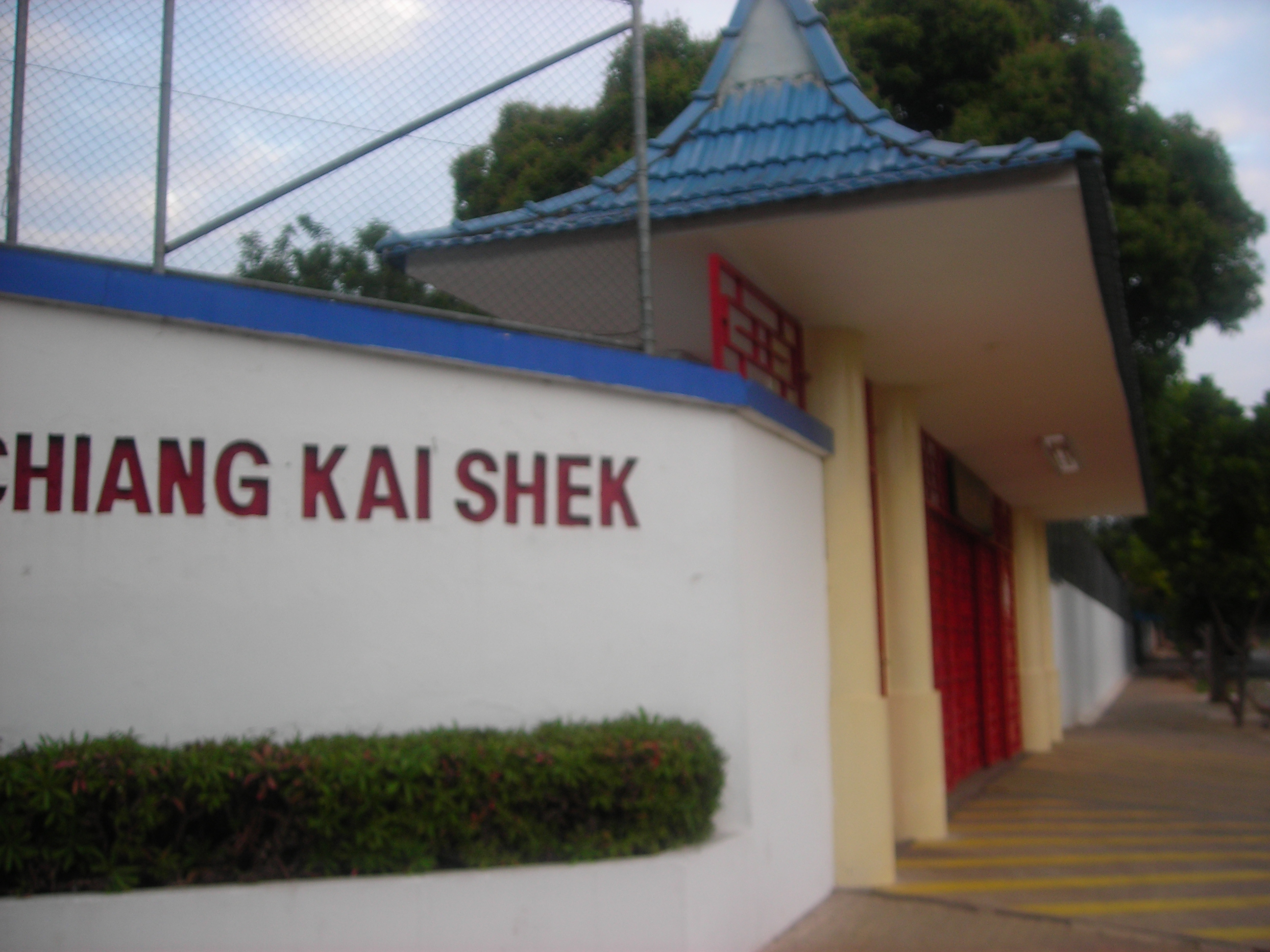 yan caise